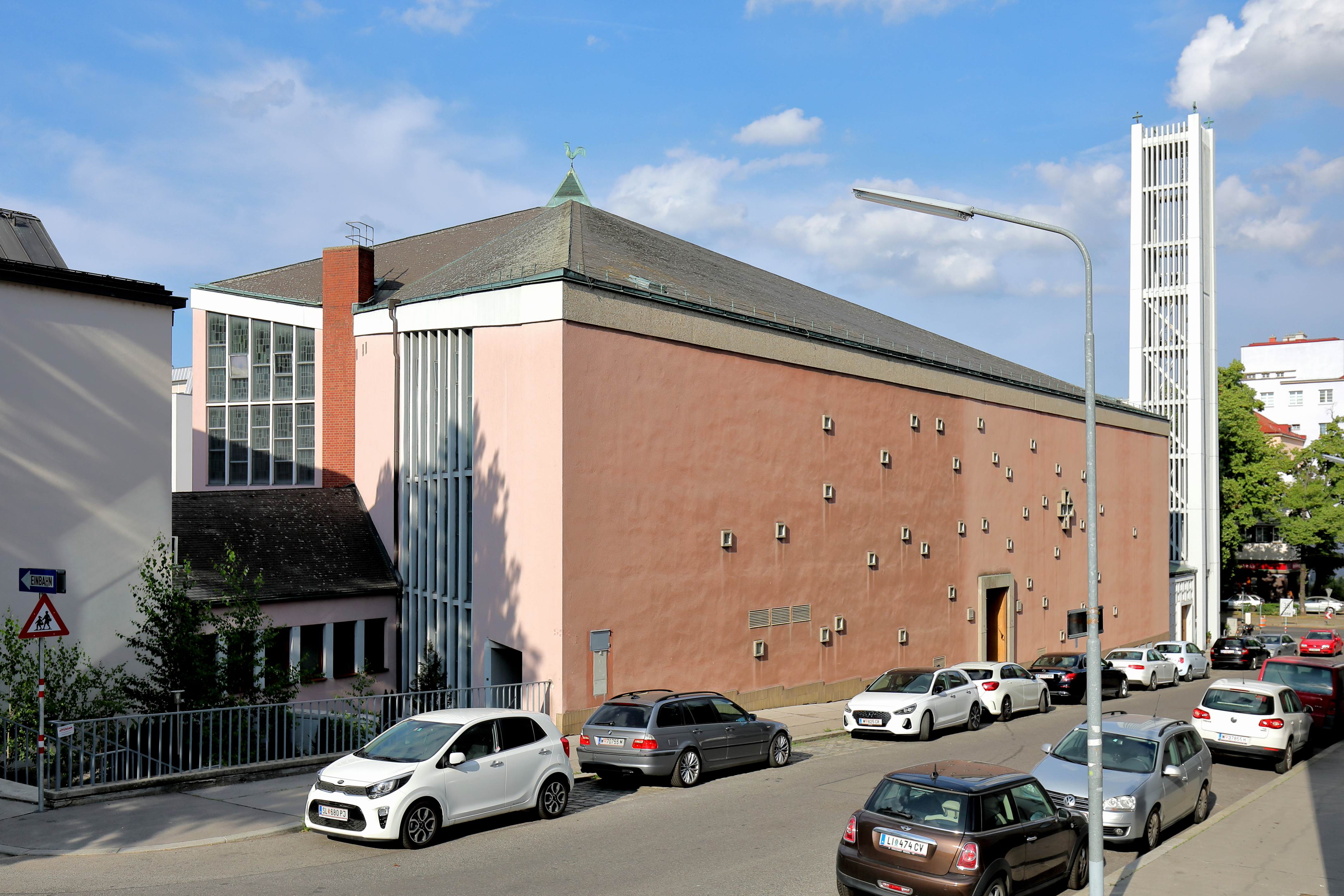 Westansicht der röm.-kath. Pfarrkirche Maria, Mutter der Gnaden an der Adresse Heiligenstädter Straße 101 in Unterheiligenstadt, ein Wiener Stadtteil im 19. Bezirk Döbling. Der zweistöckige Saalbau mit einem Grundriss in Form eines gleichseitigen Dreiecks sowie abgerundetem Chorraum und Zeltdach wurde ab 1965 nach Plänen des Architekten Carl Müller und seines Sohnes errichtet und am 5. November 1966 geweiht.